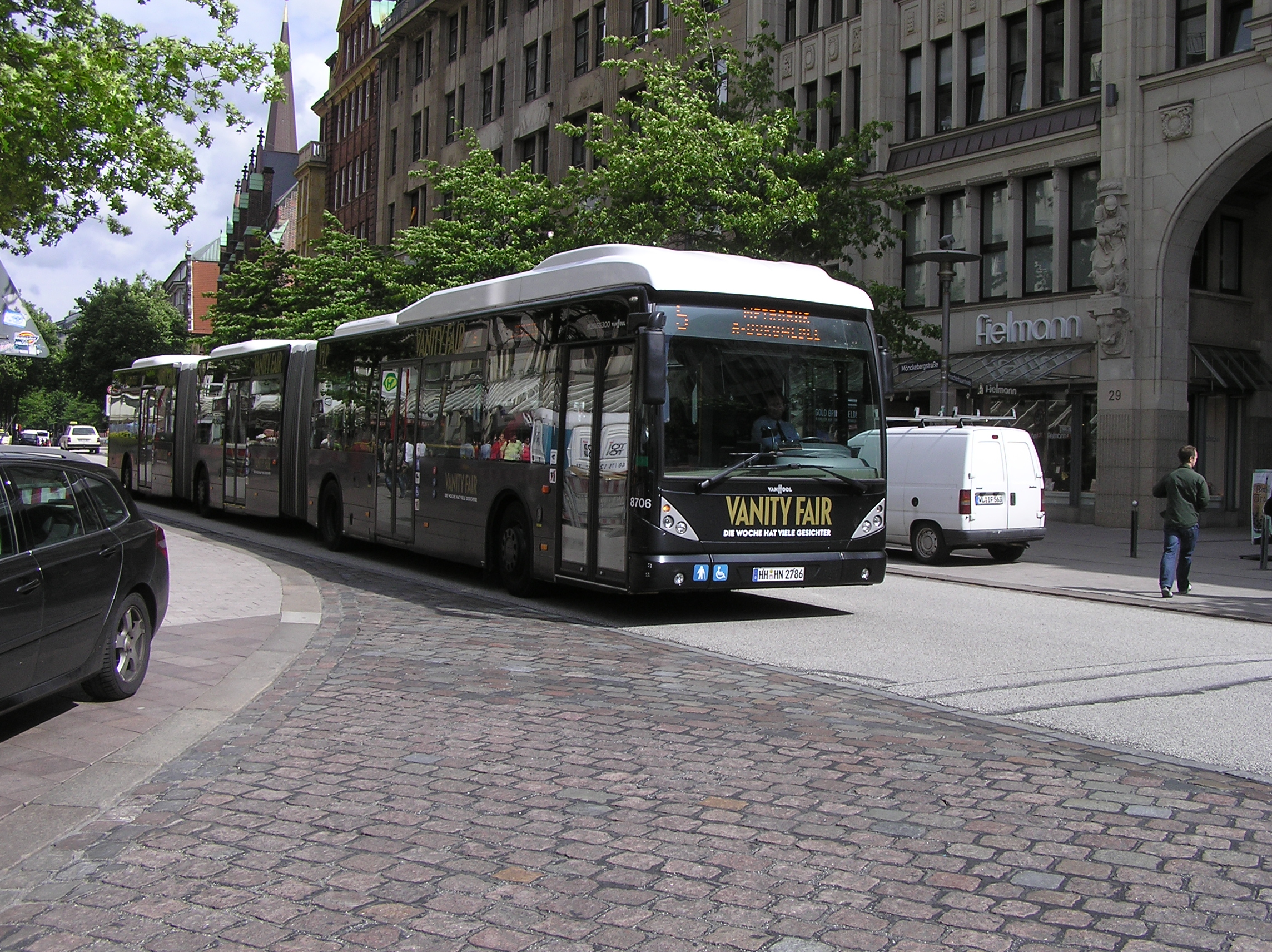 Doppelgelenkbus der Firma VanHool als Metrobus-Linie 5 der Hamburger Hochbahn AG in der Mönckebergstraße Ecke Rathausmarkt in Hamburg